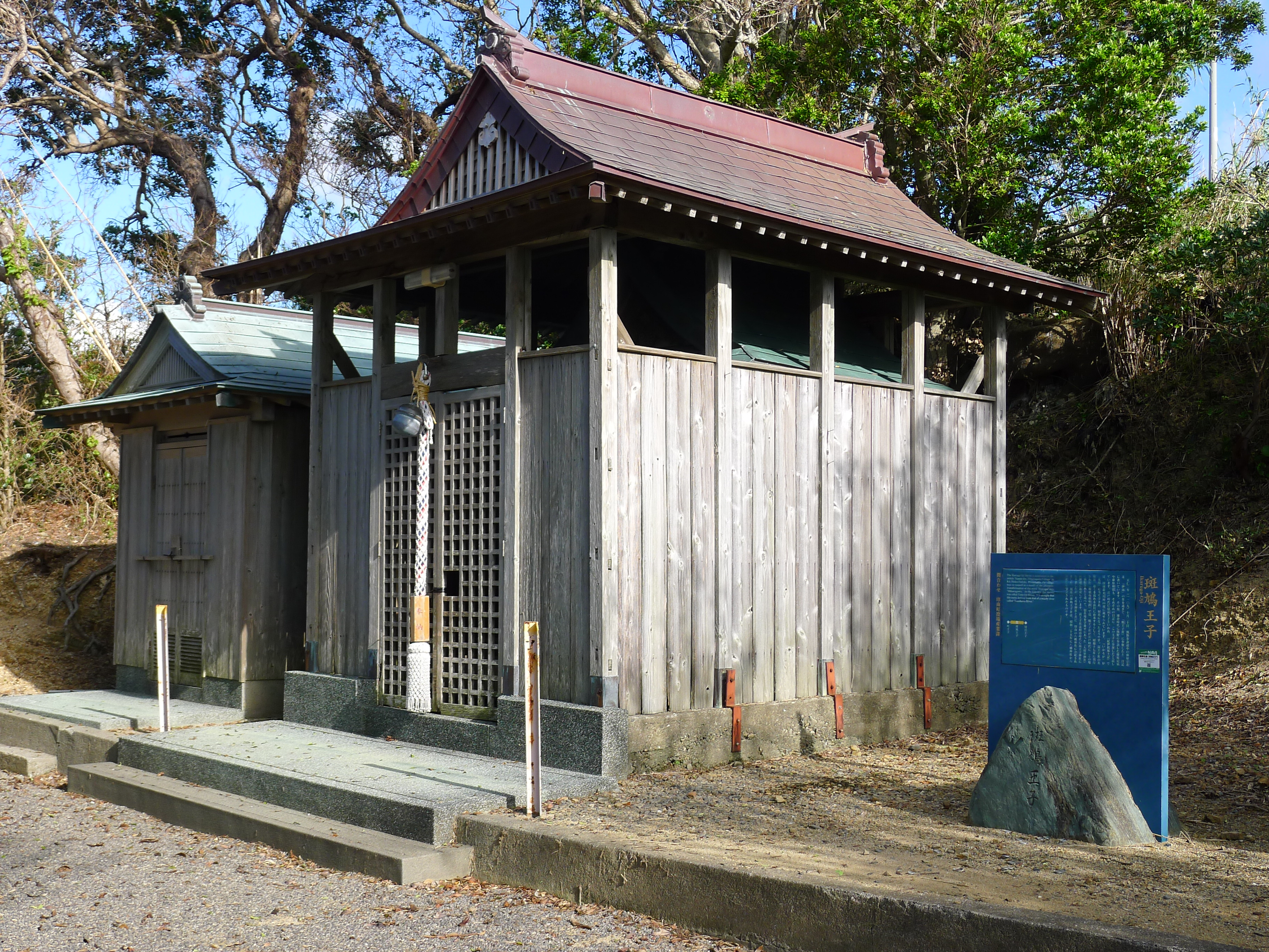 熊野古道・紀伊路の九十九王子の一つ斑鳩王子（和歌山県印南町）